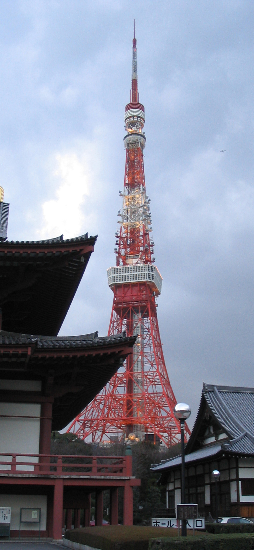 Tokyo Tower in Minato-ku, Tokyo.